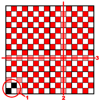 Beschreibung: Das Bild zeigt eine Bindungspatrone für eine Leinwandbindung. 1 = Rapport 2 = Verlauf der Kettfäden 3 = Verlauf der Schussfäden Rote Felder = Ketthebung (Kettfäden oben) Schwarze Felder = Ketthebung im Rapport Weiße Felder = Kettsenkung (Schussfäden oben)